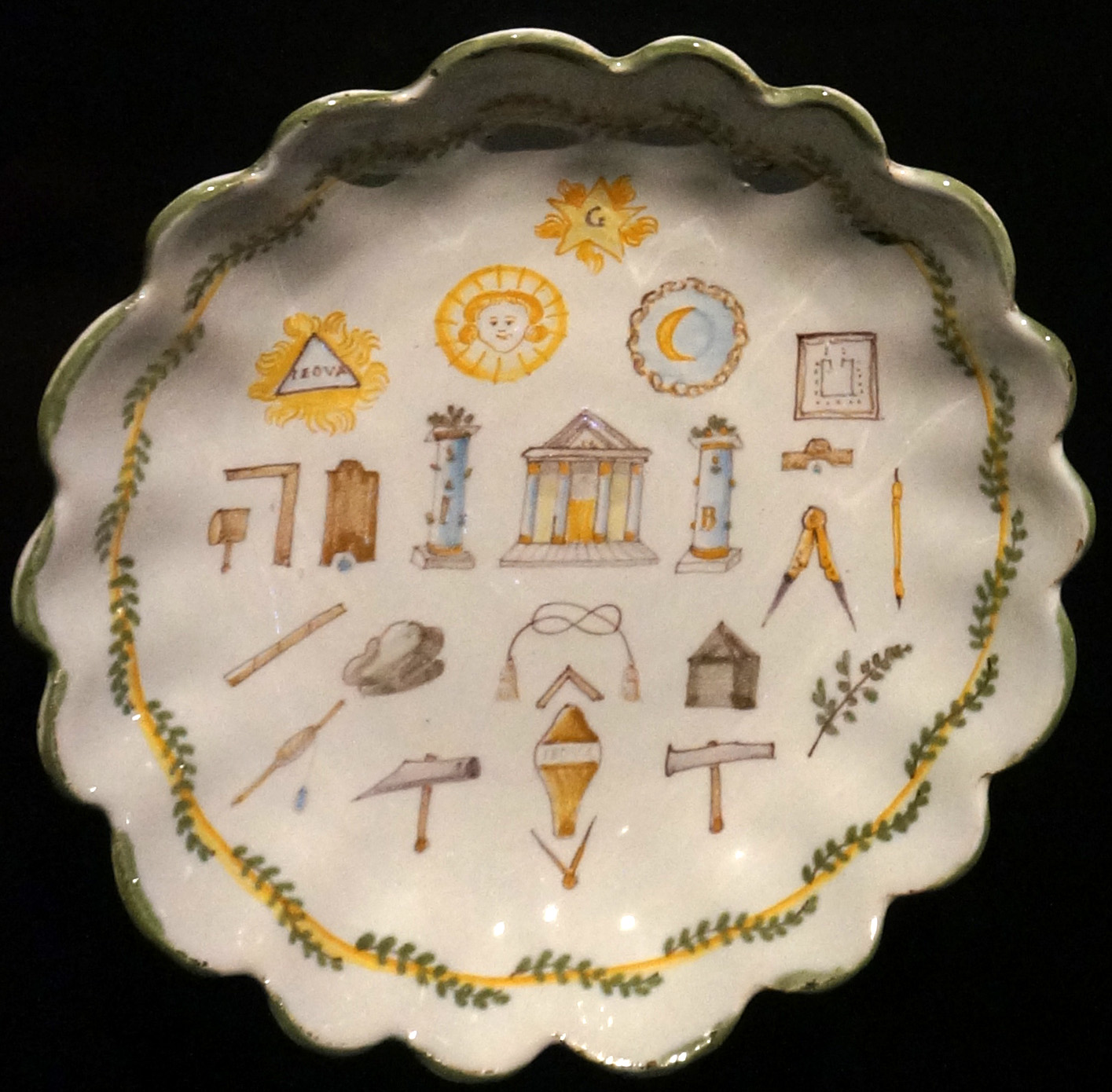 Collection du Musée de la Franc-Maçonnerie.